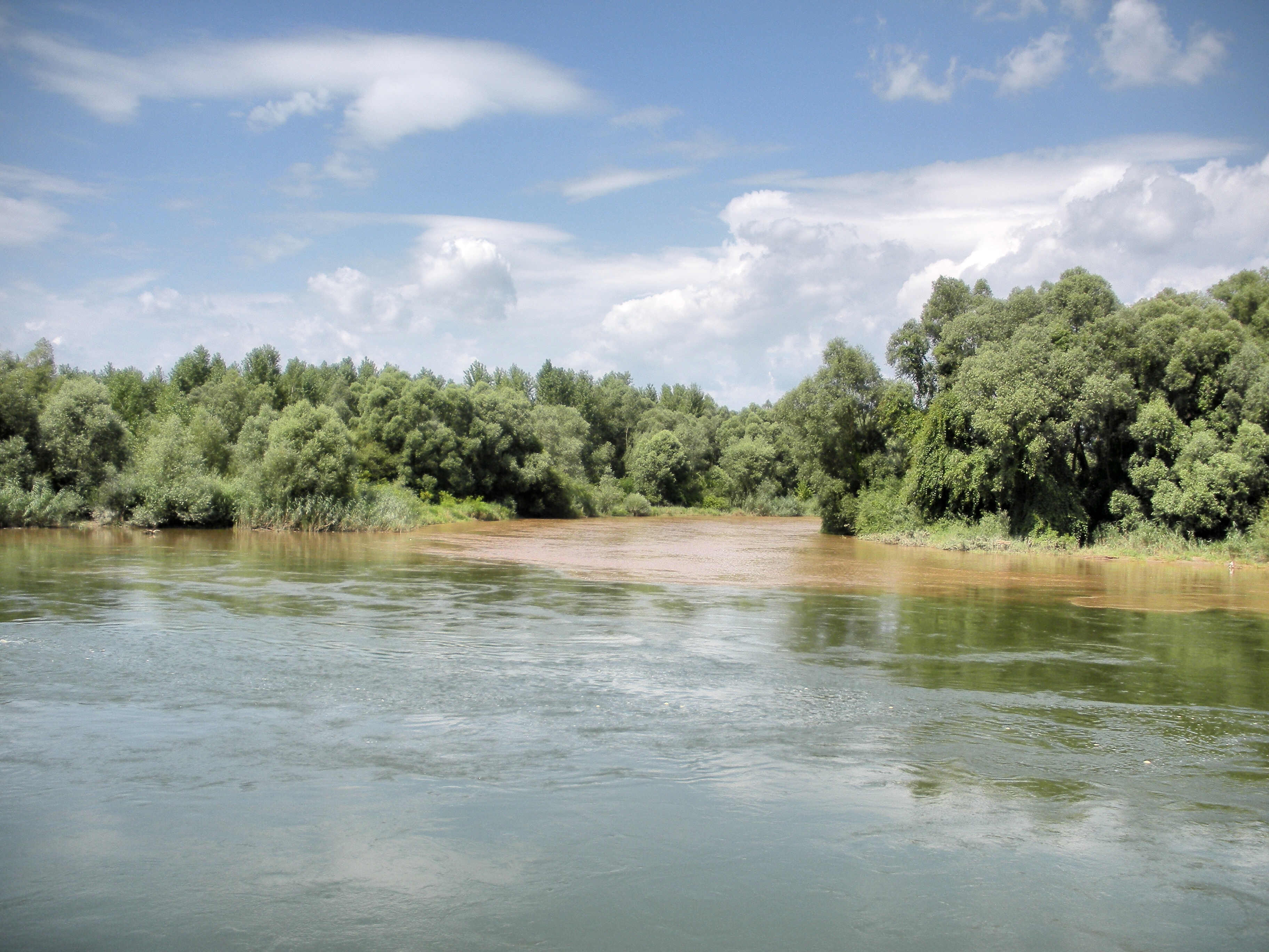 Zusammenfluss von Drau (im Vordergrund) und Mur in der Nähe von Legrad (Kroatien)